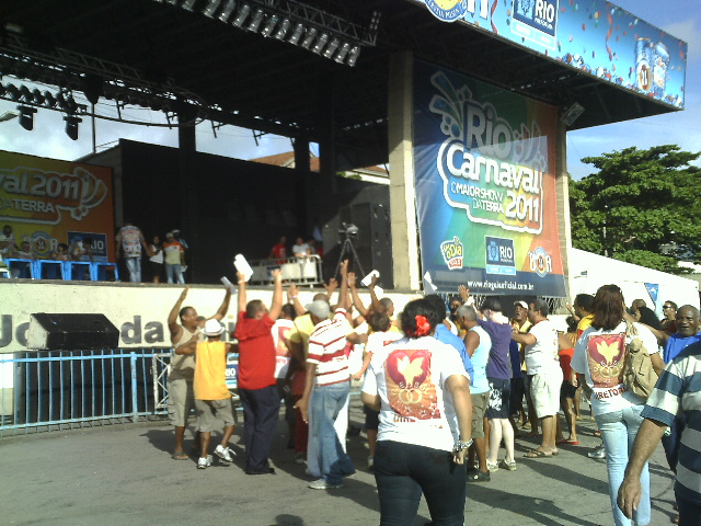 Comemoração da escola de samba Unidos de Lucas, campeã do Grupo E (sexta divisão), em 2011.